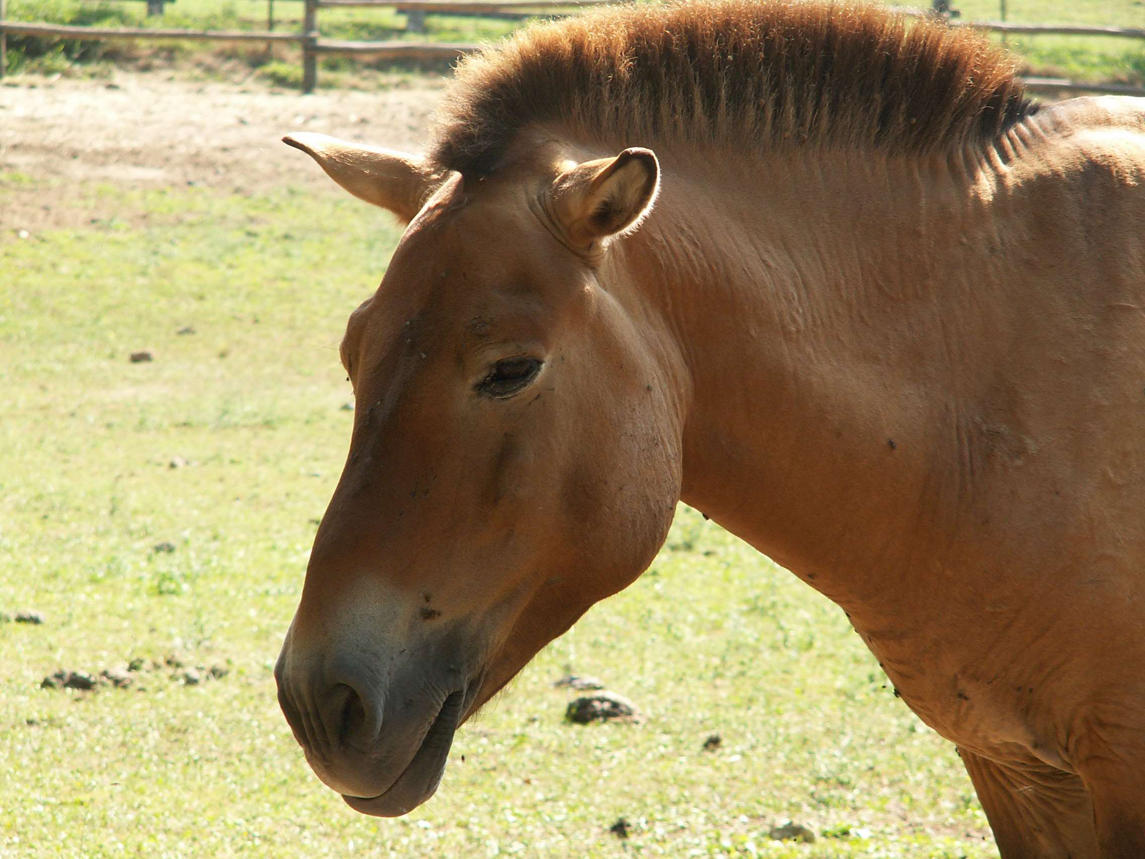 Przewalski's Horse (Equus ferus przewalskii or Equus caballus przewalskii).